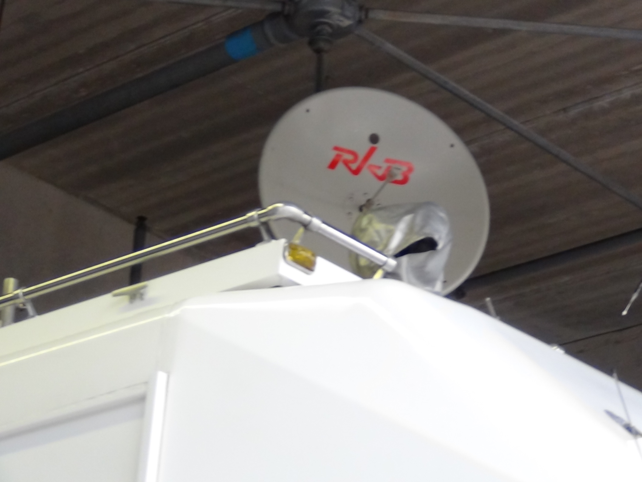 2012年6月24日に撮影。